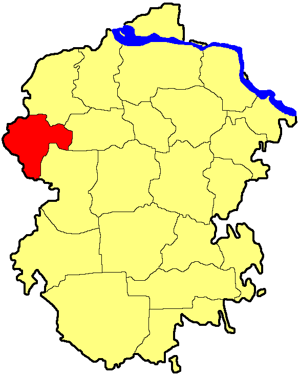 Крансочетайський район Чувашії